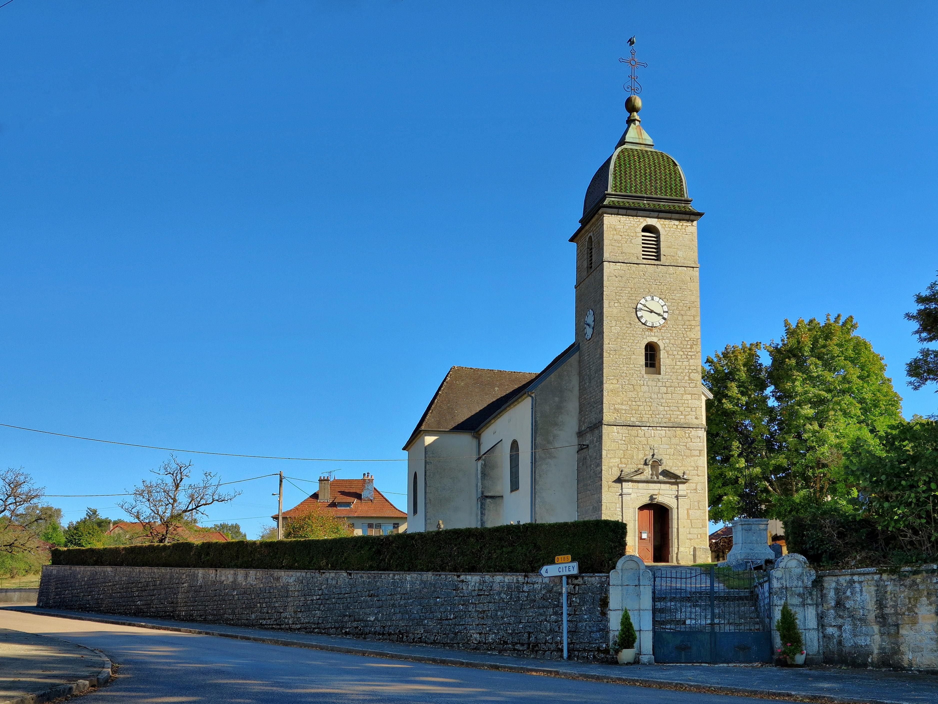 L'église